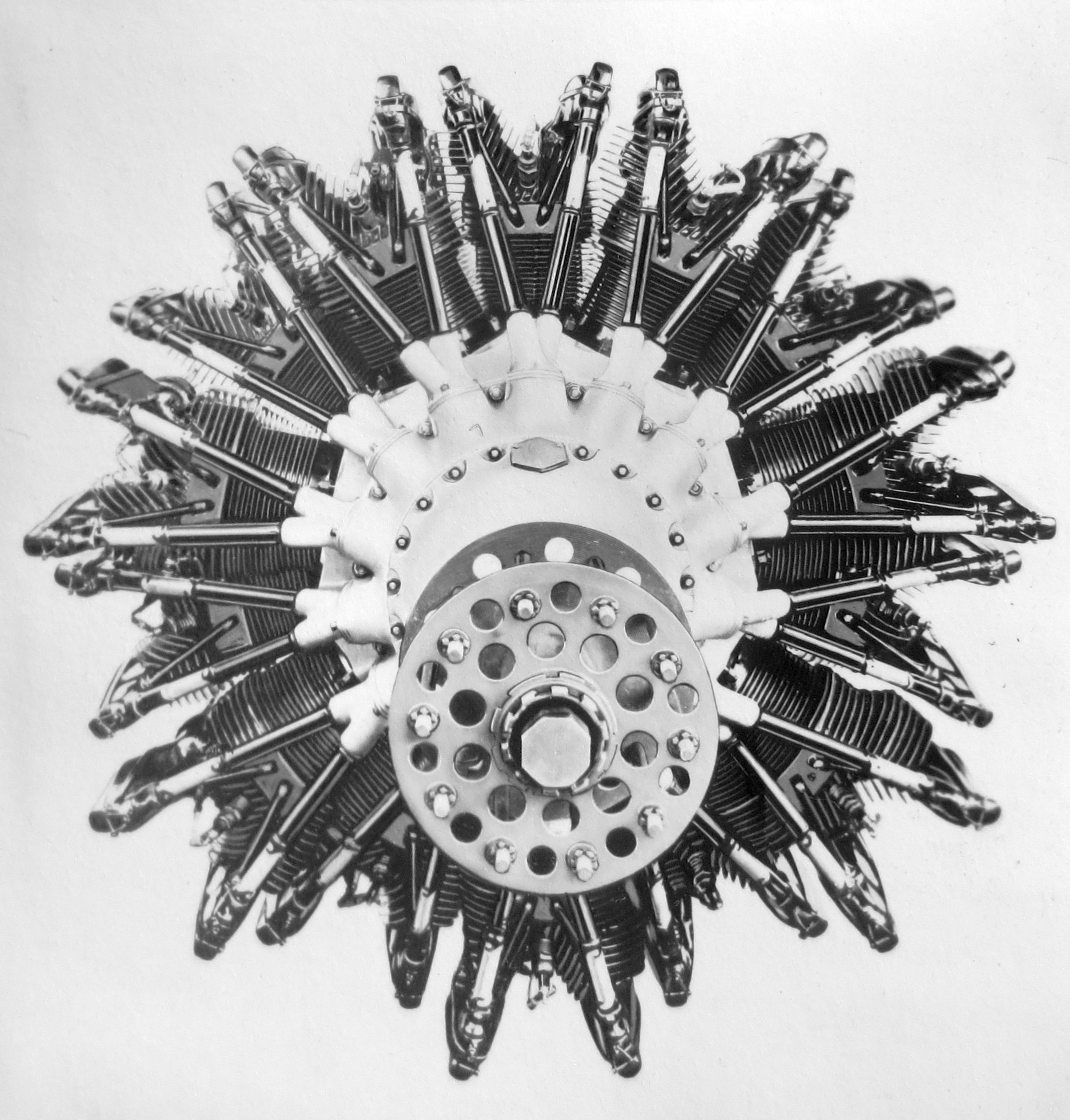 Walter Mistral K 14-I (1934-37), čtrnáctiválcový dvouřadý přeplňovaný vzduchem chlazený hvězdicový motor